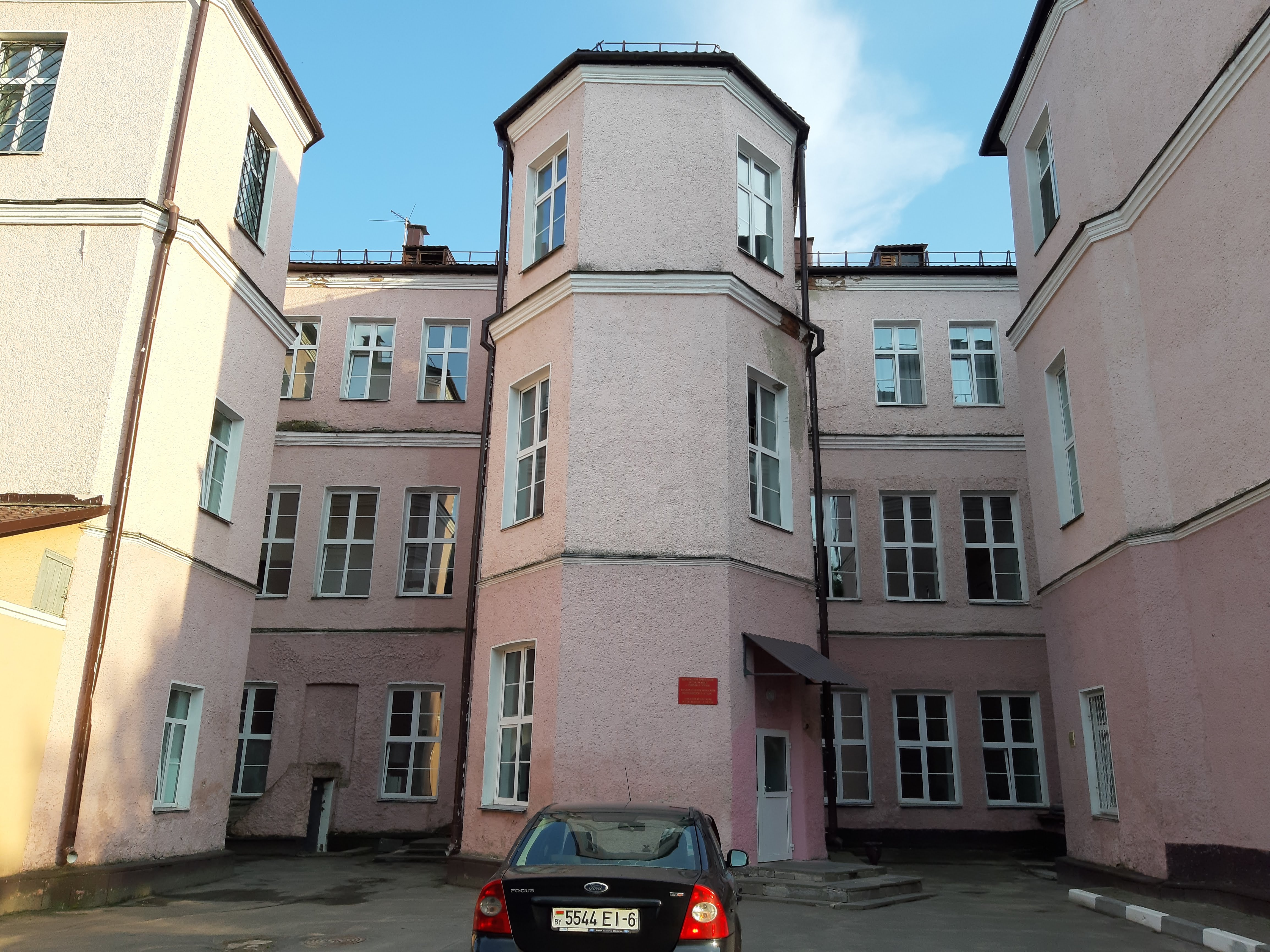 Магілёў. Гарадская бальніца